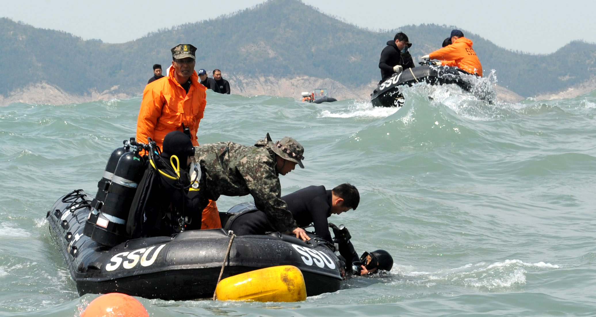 해군해난구조대(SSU)와 특수전전단(UDT/SEAL) 소속 잠수사들이 20일 고속단정과 고무보트에 나눠 타고 높은 파도와 강한 조류를 극복하며 세월호 침몰사건 실종자 탐색·구조 작전을 펼치고 있다.